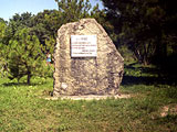 Kamenj